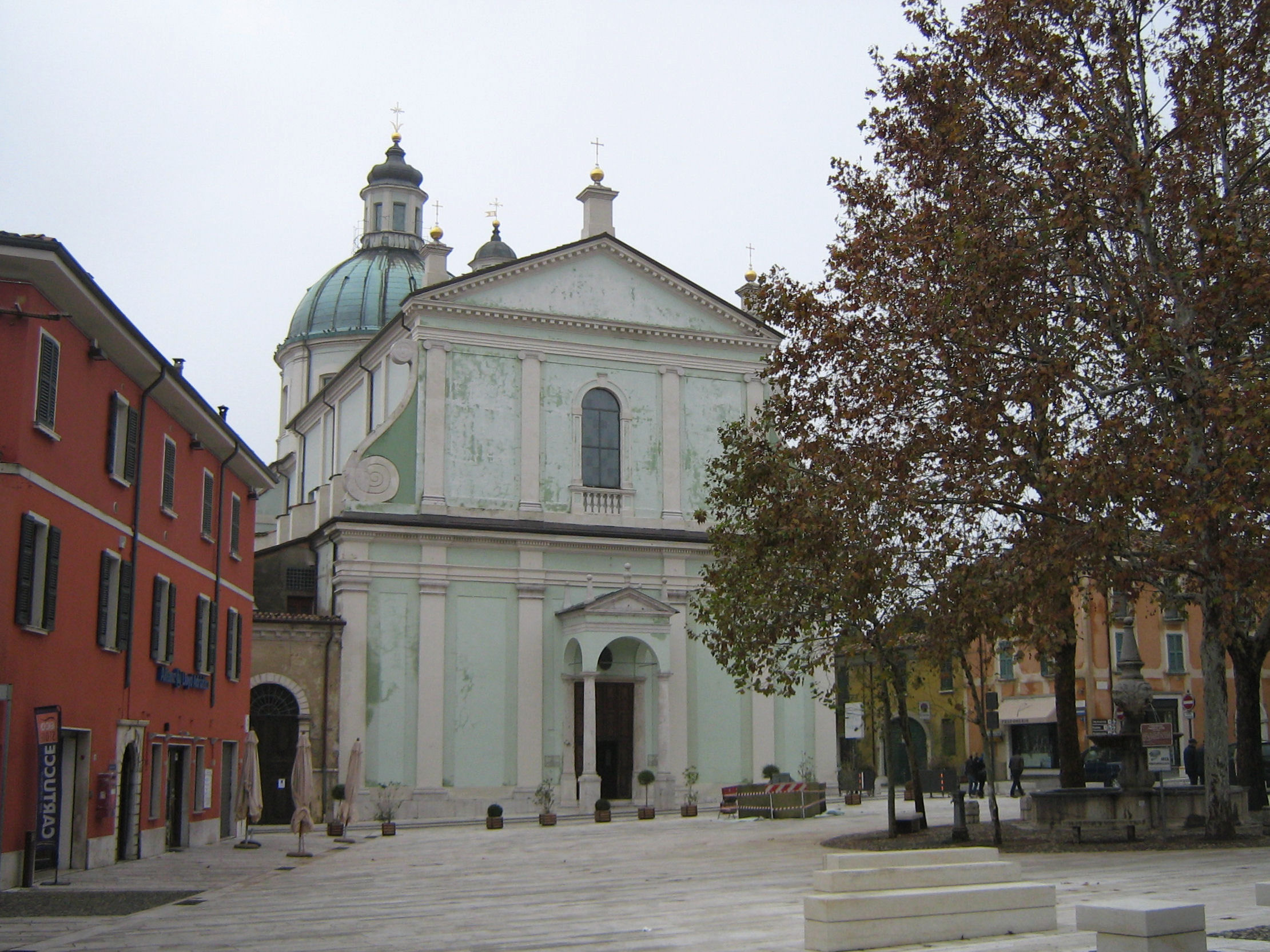 Castiglione dele Stiviere, Basilica di S. Luigi.